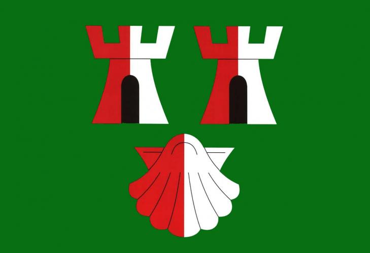 vlajka,Drahoňův Újezd, okres Rokycany